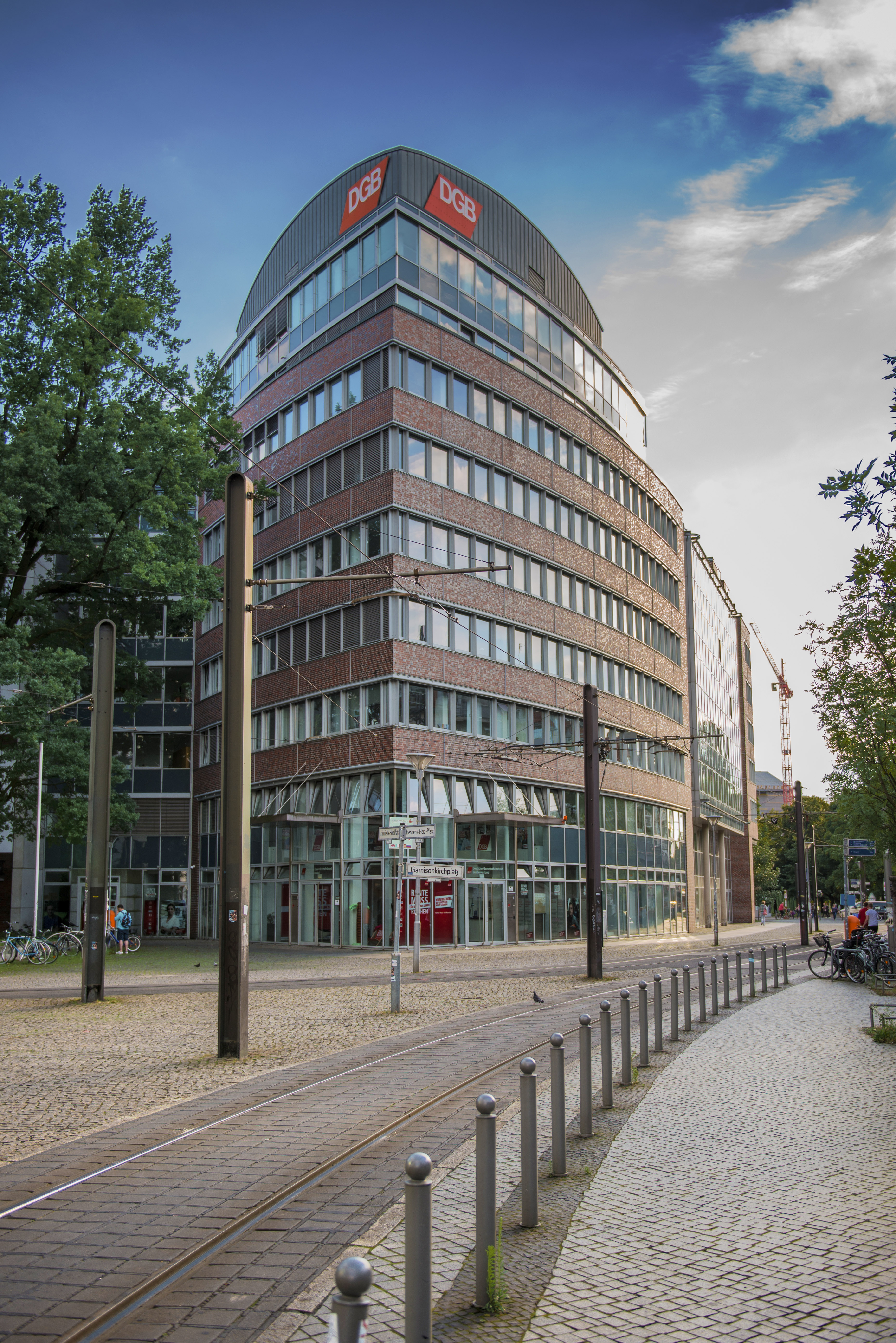 Deutscher Gewerkschaftsbund – Bundesvorstand